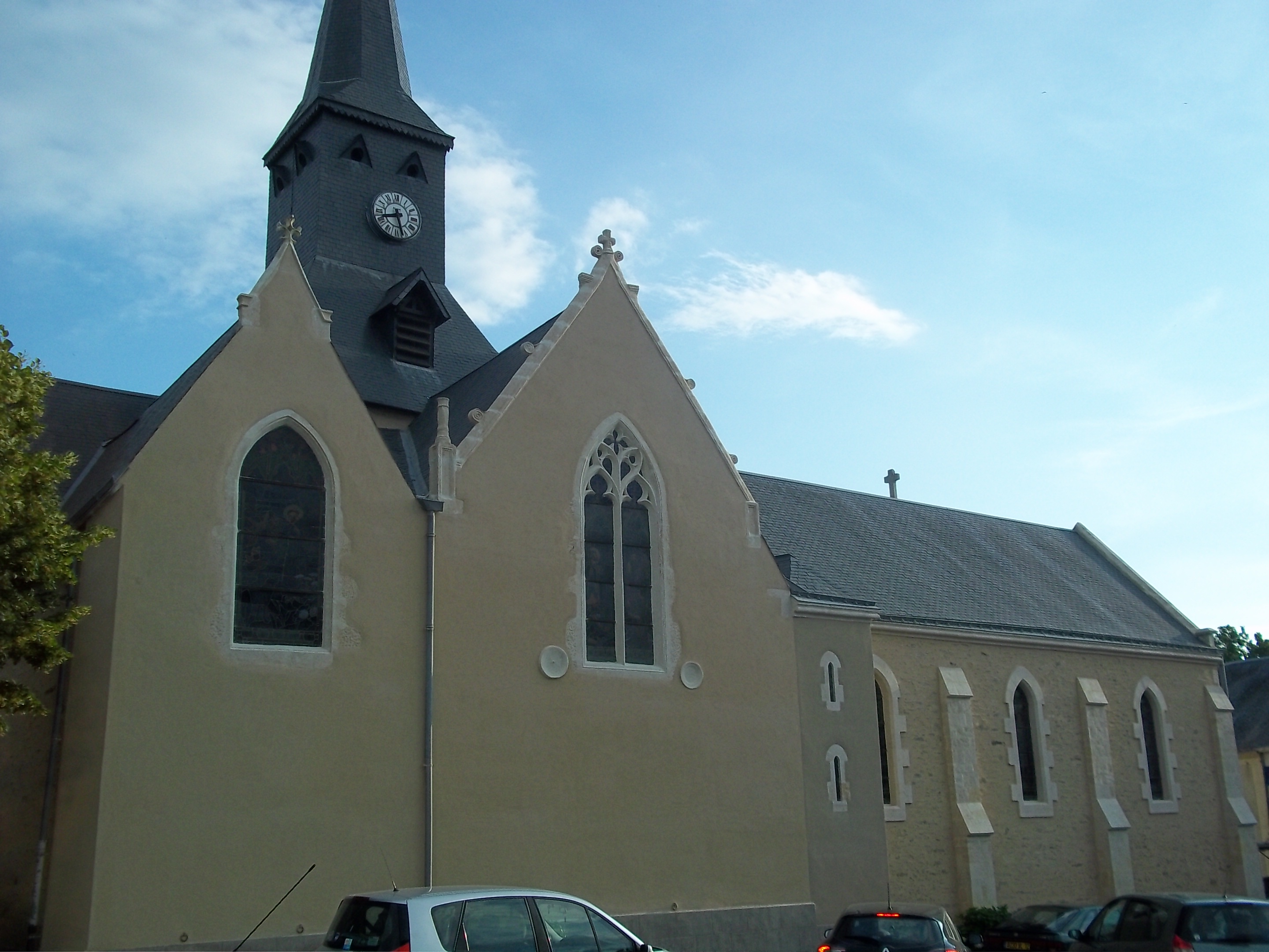 Eglise